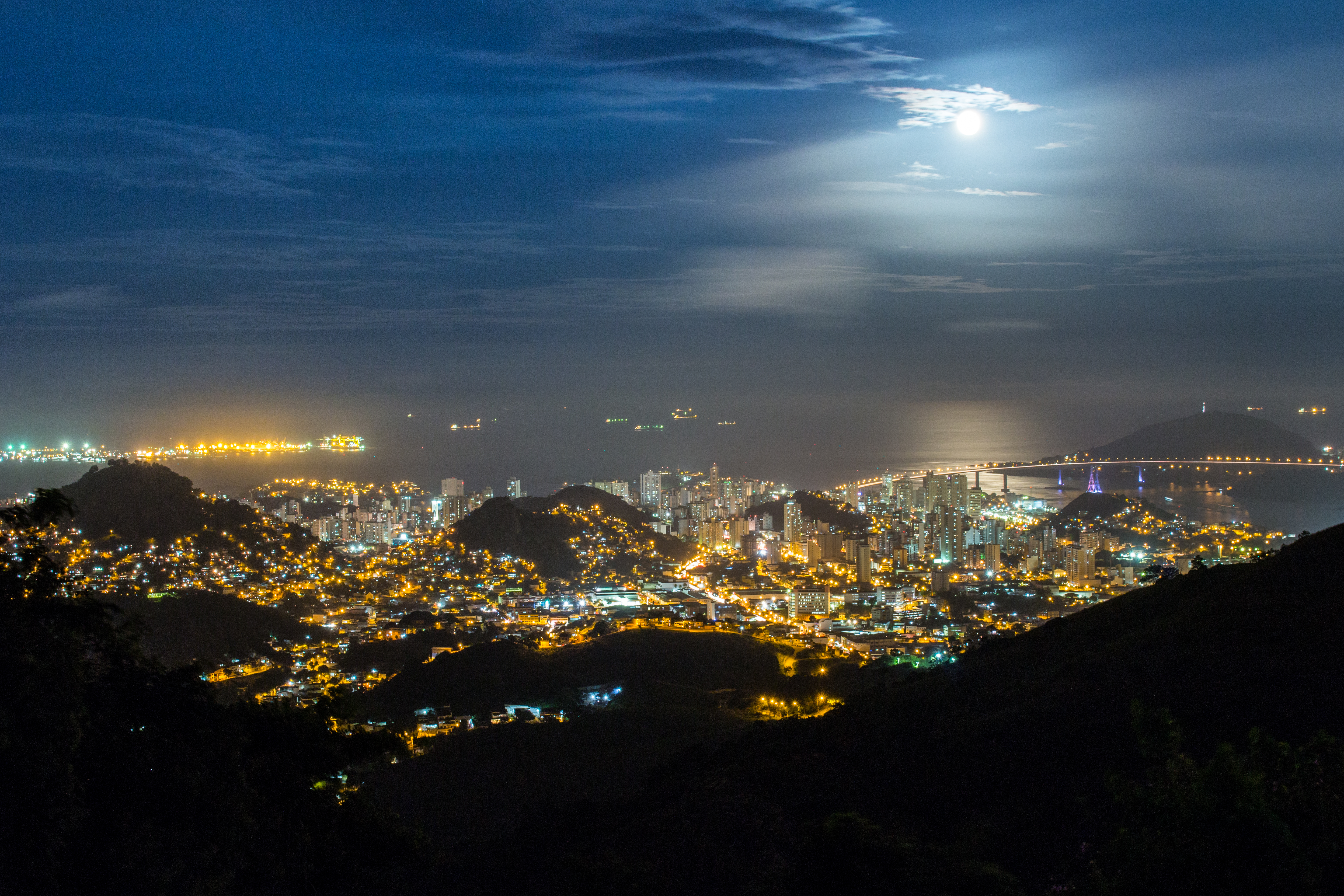 Vista noturna do mirante do Parque da Fonte Grande